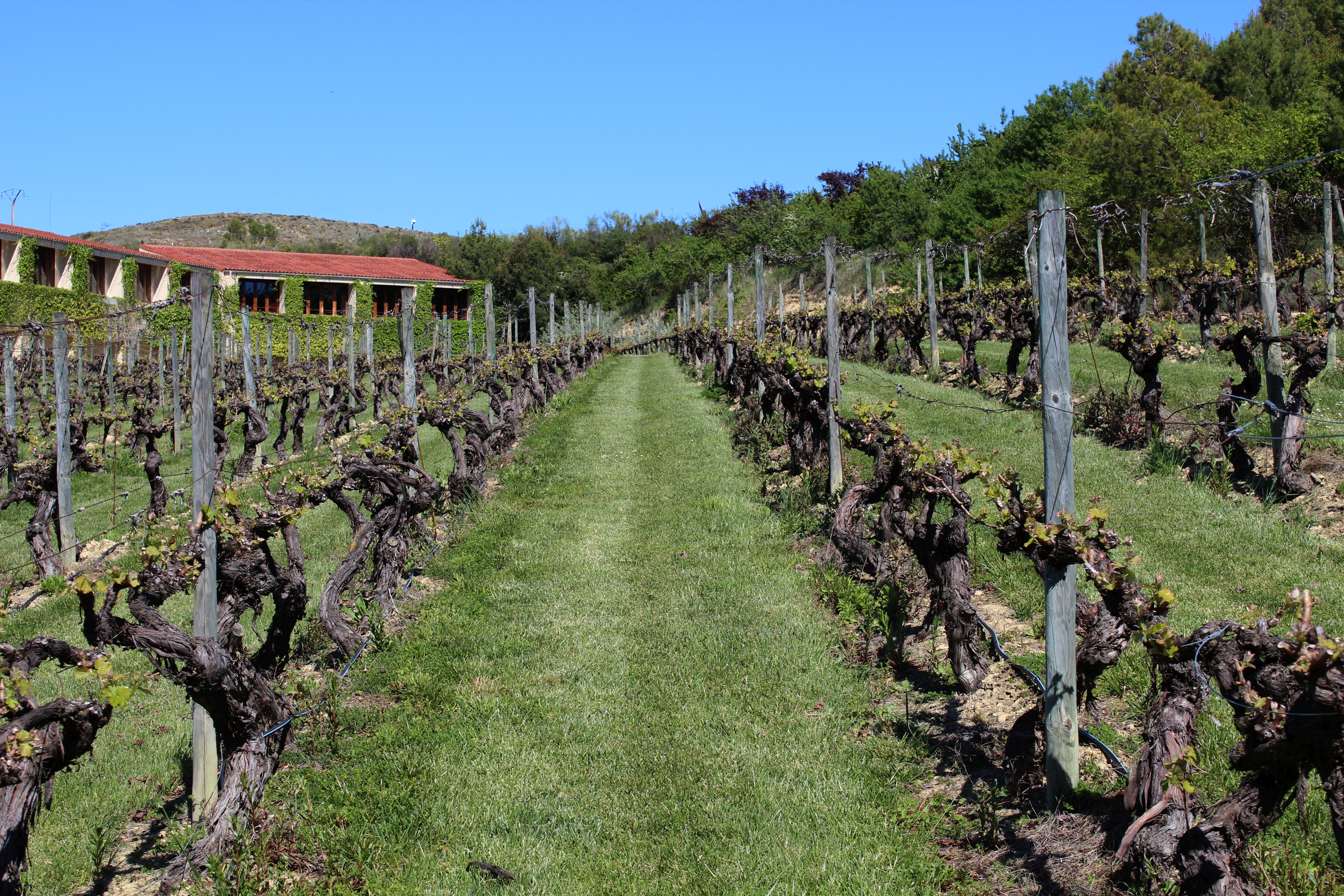 Elciego, Bodegas Marqués de Riscal: Alte Rebstöcke des Weinguts Ende April 2019